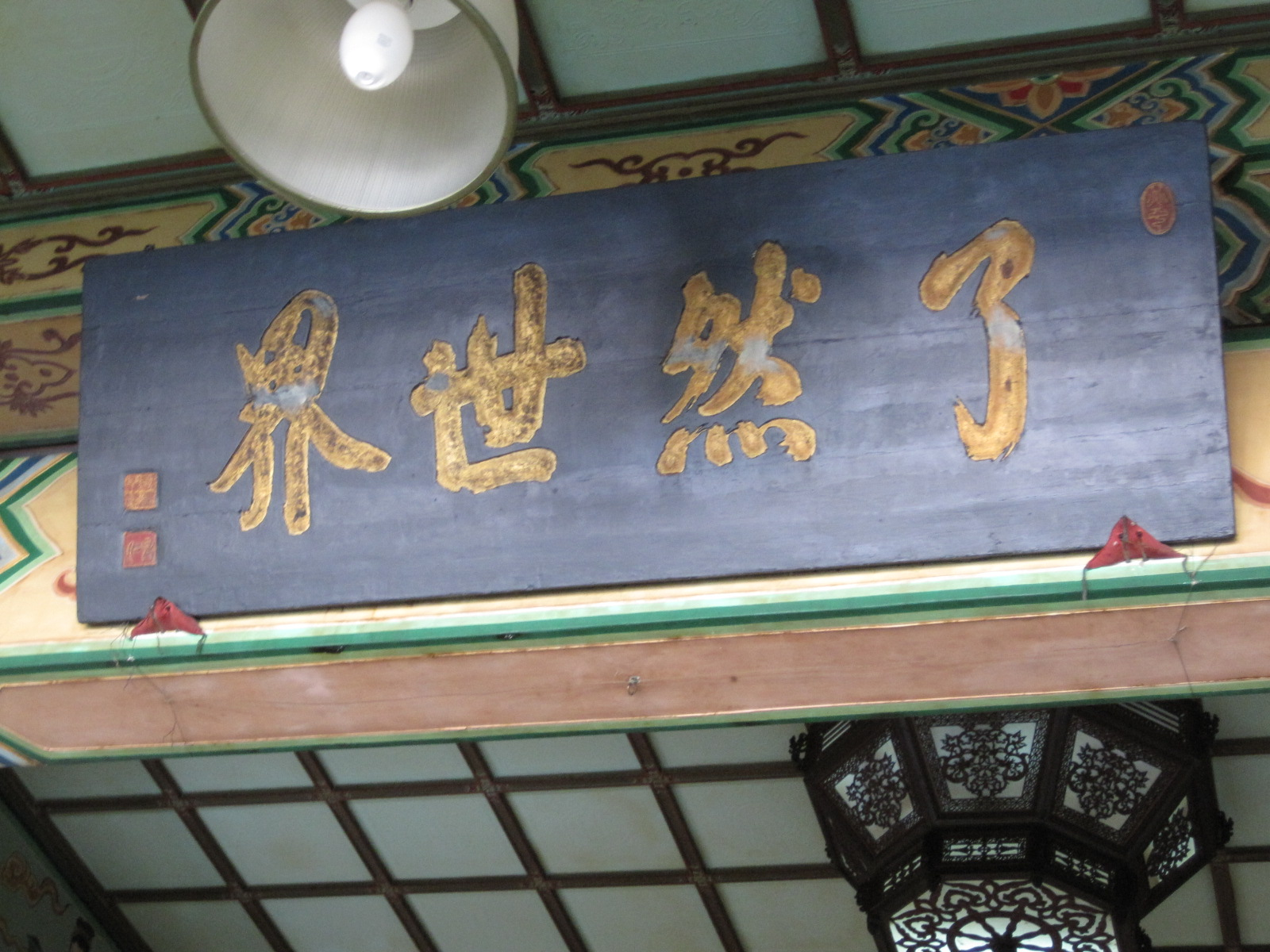 臺南竹溪寺「了然世界」匾